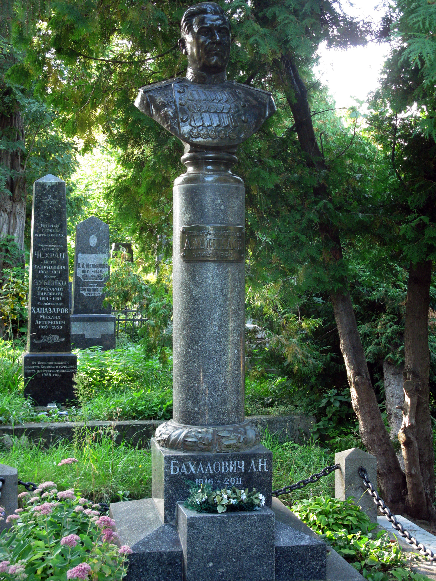 Могила генерал-лейтенанта А.М.Шилова. 1892-1954рр.